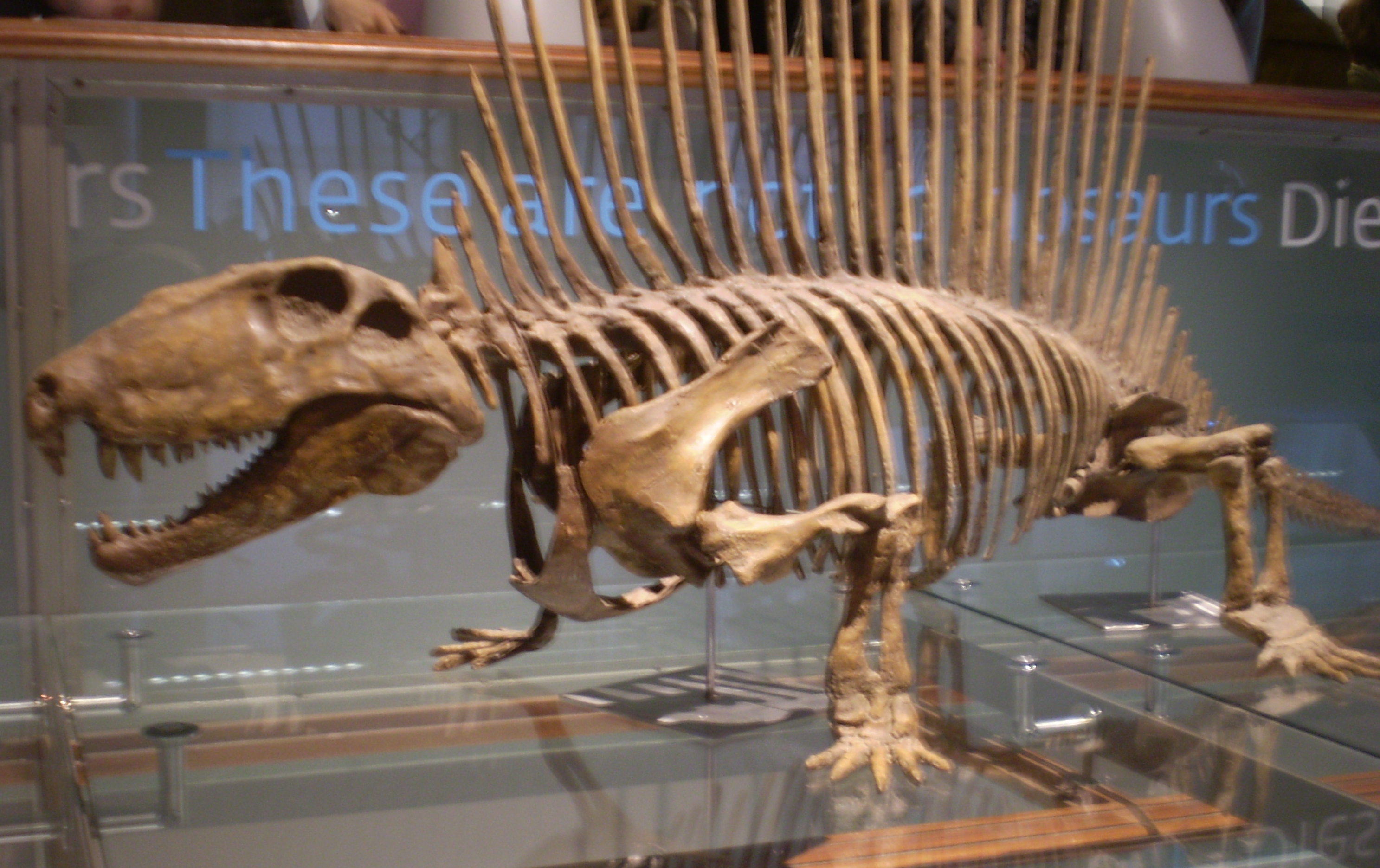 Dimétrodon (moulage), Institut Royal des Sciences naturelles de Belgique, Bruxelles